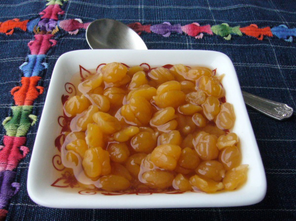 Dulce de garbanzos o miell de garbanzos, típico postre guatemalteco